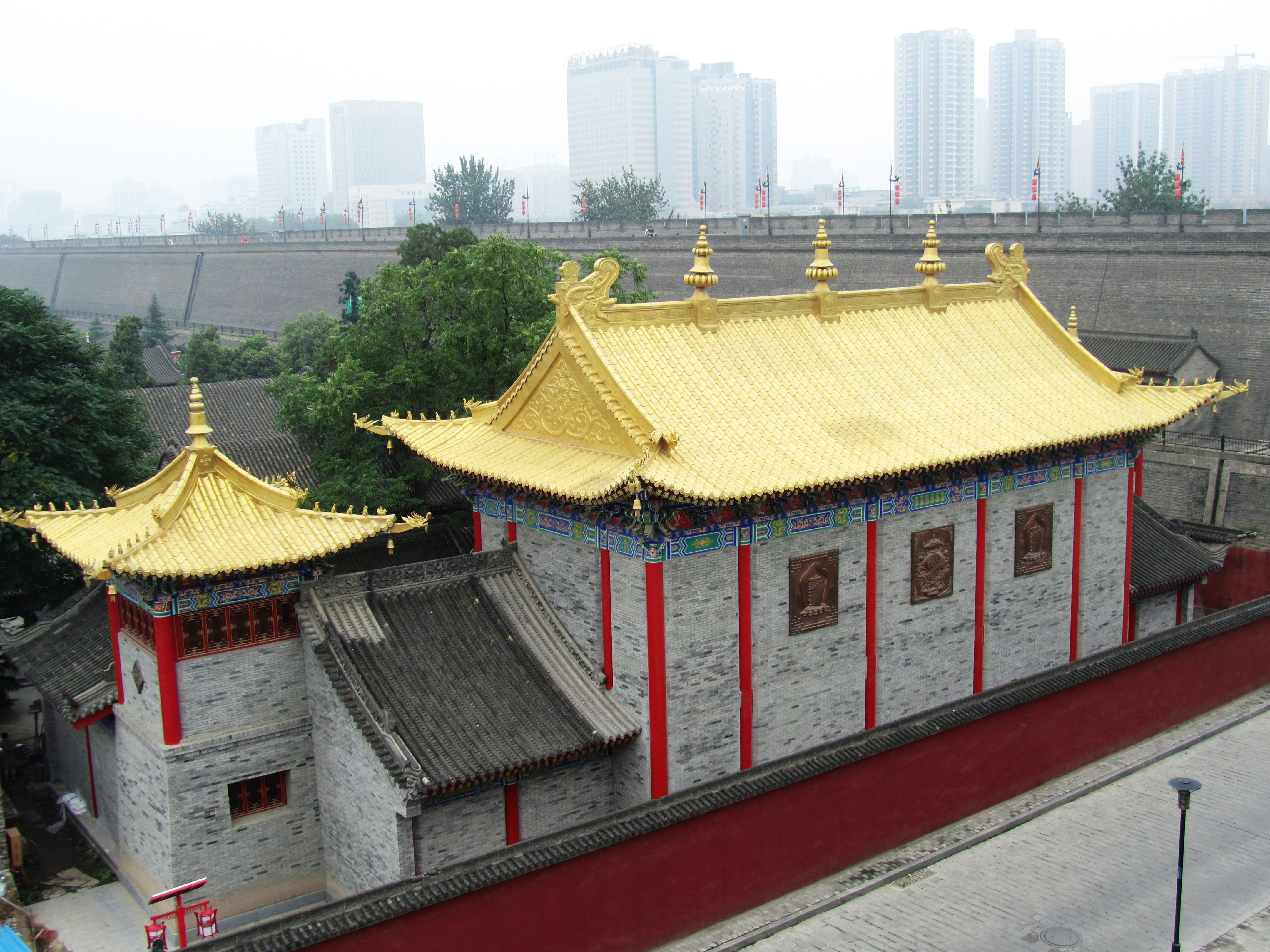 广仁寺，法堂北面，自北向南看。